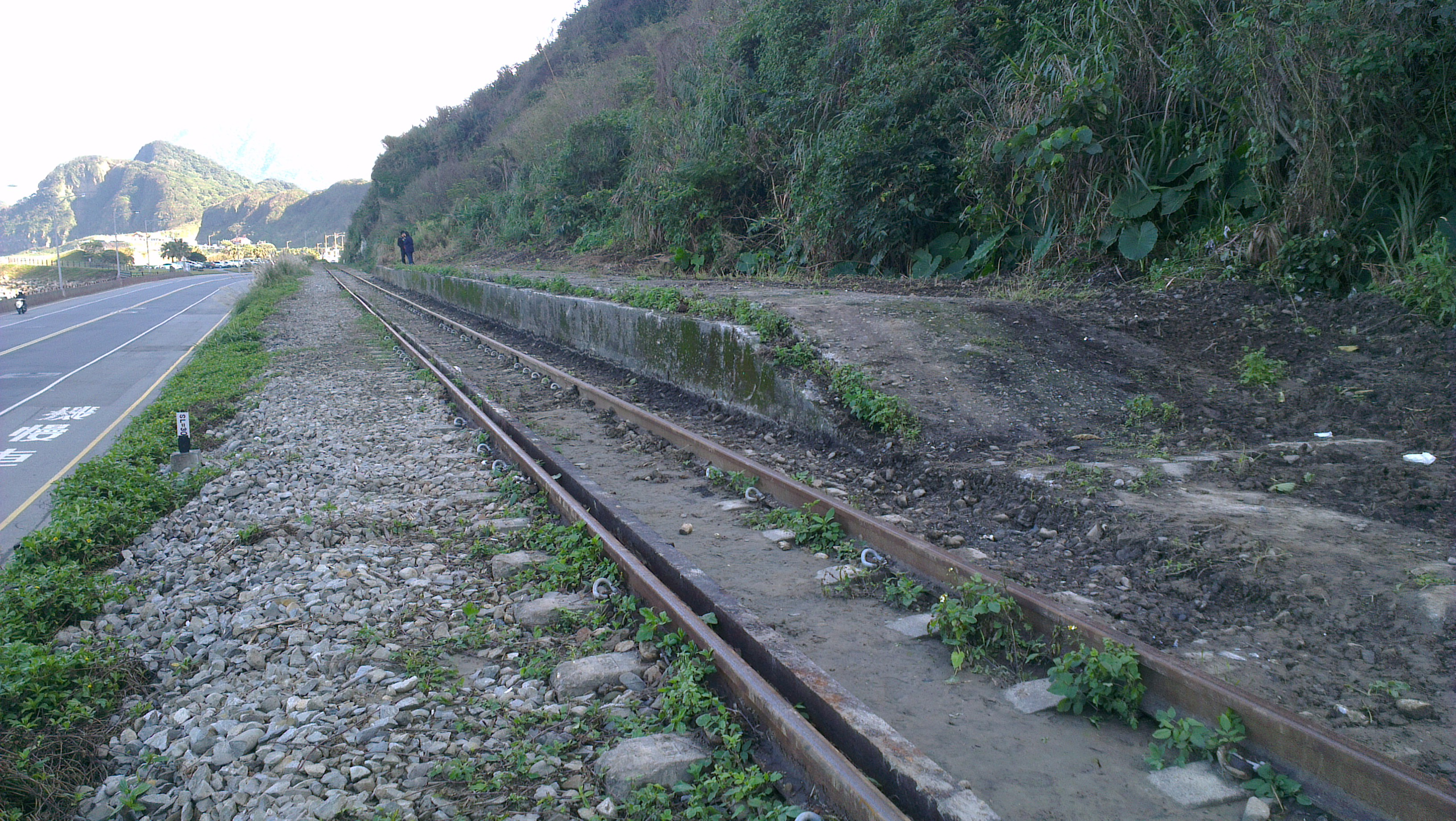 中文（台灣）: 臺灣鐵路管理局八斗子車站進行復站改建工程前之月台。